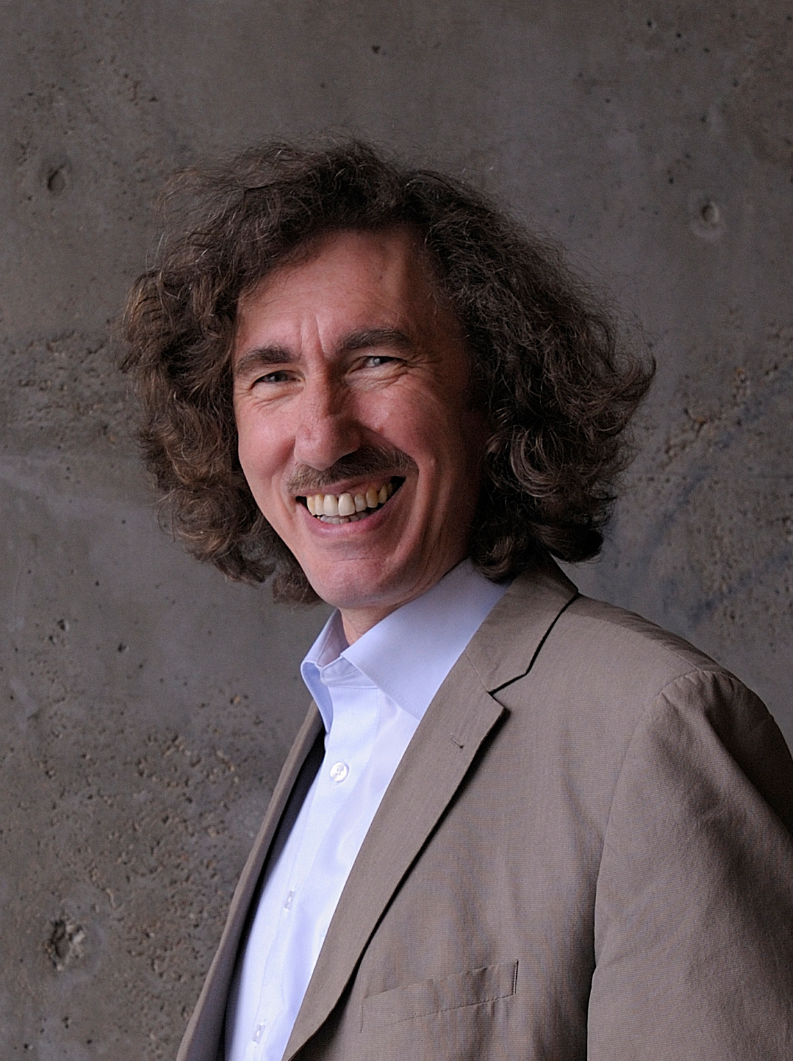 Portrait von Thomas Jocher